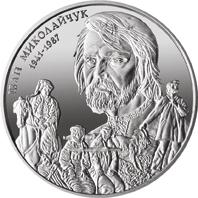 Монета НБУ «Іван Миколайчук»